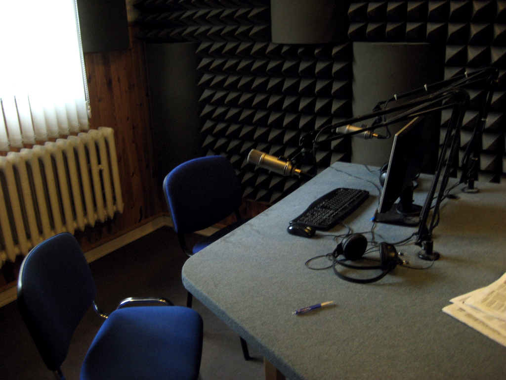 Studio emisyjne Radia Afera Poznań.